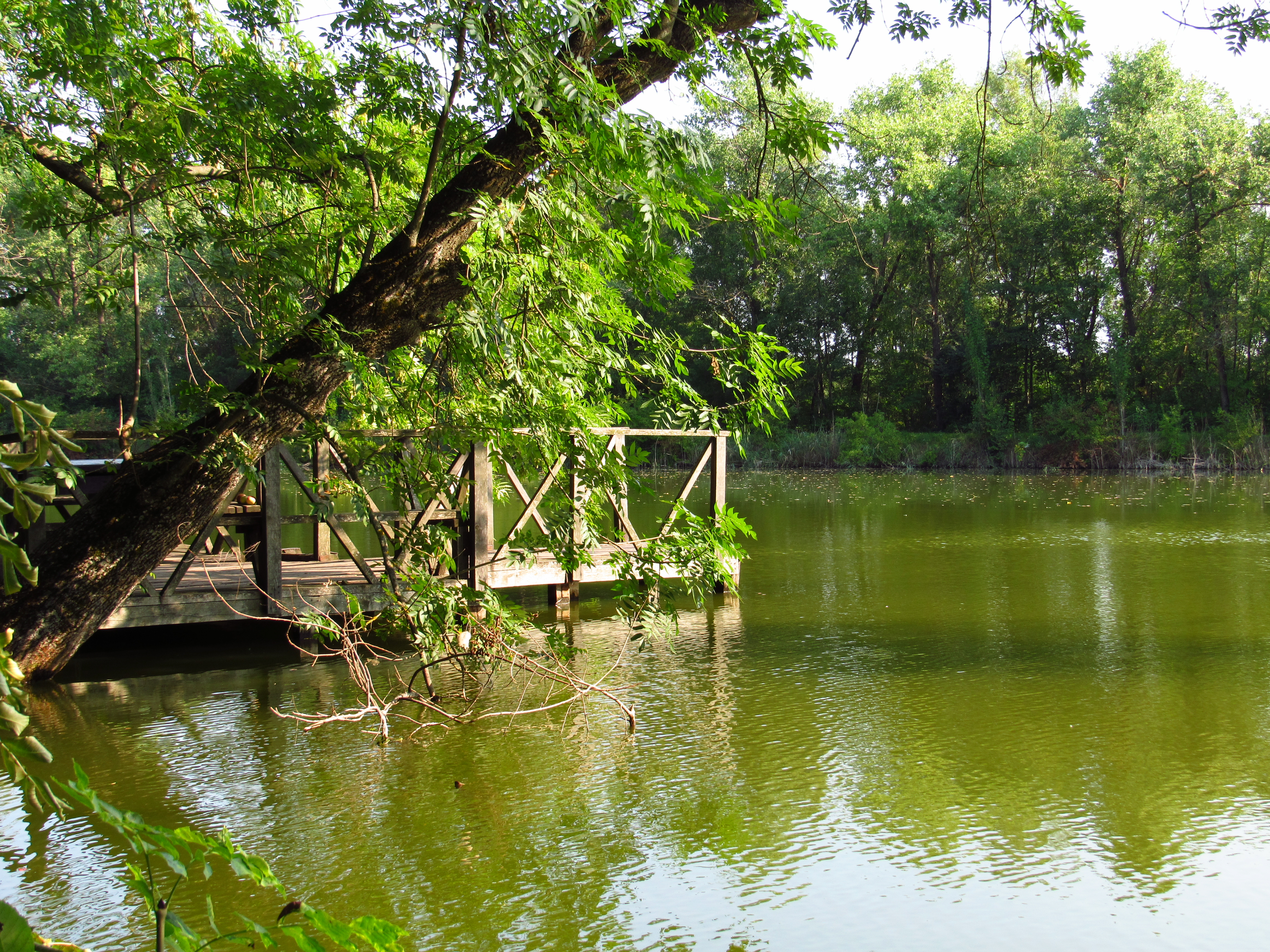 «Хутір Надія», Кіровоградський р-н, с. Миколаївка